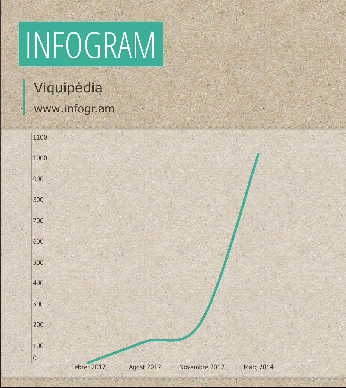 Infogram, infogr.am